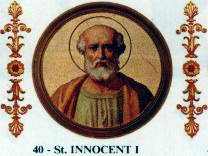 Pope Innocent I